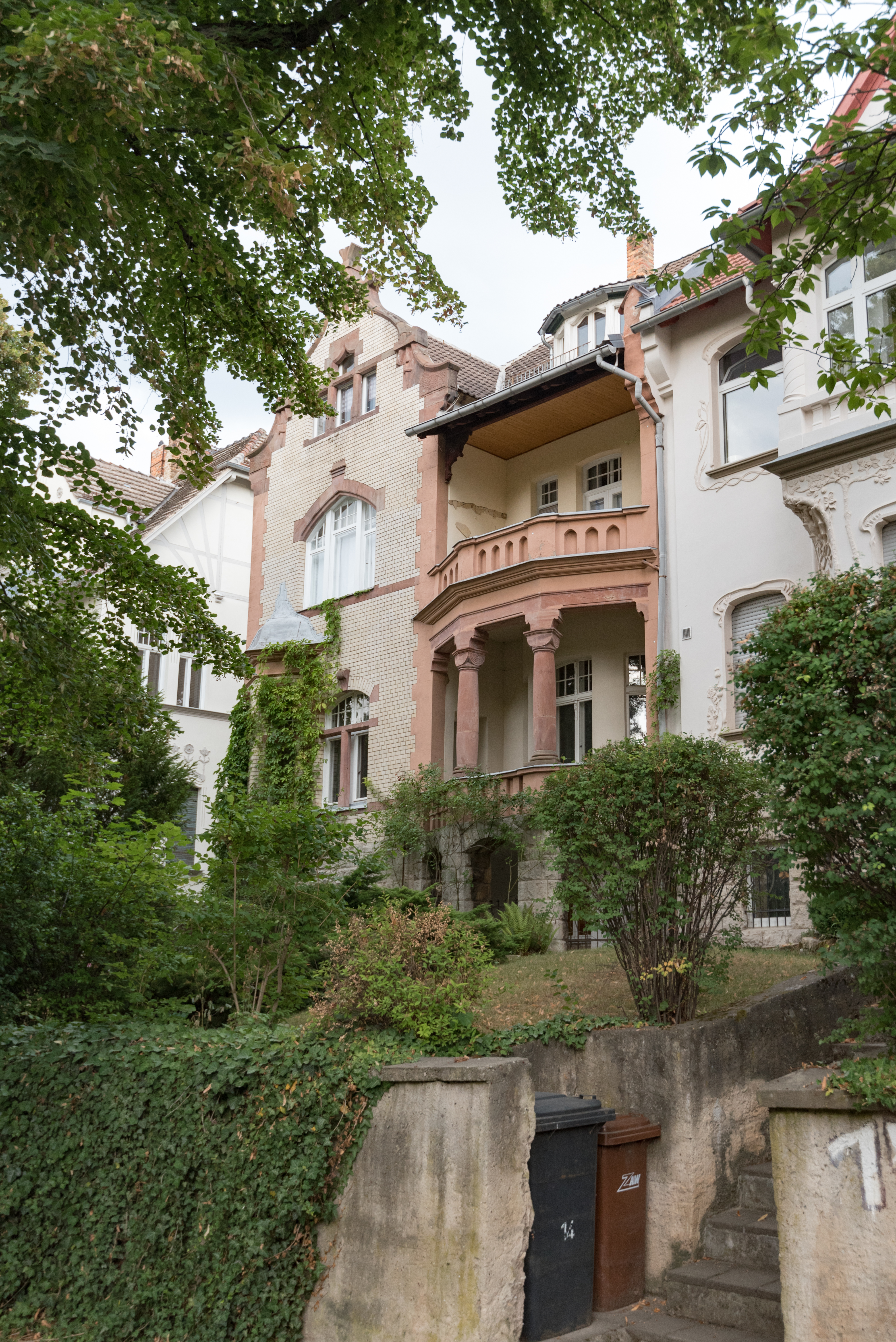 Naumburg (Saale), Luisenstraße 13